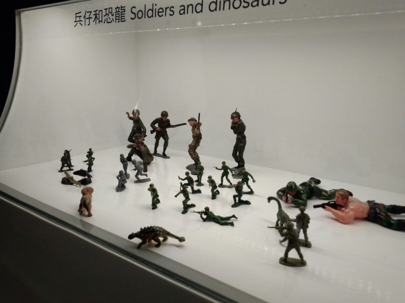 玩具士兵在香港历史博物馆